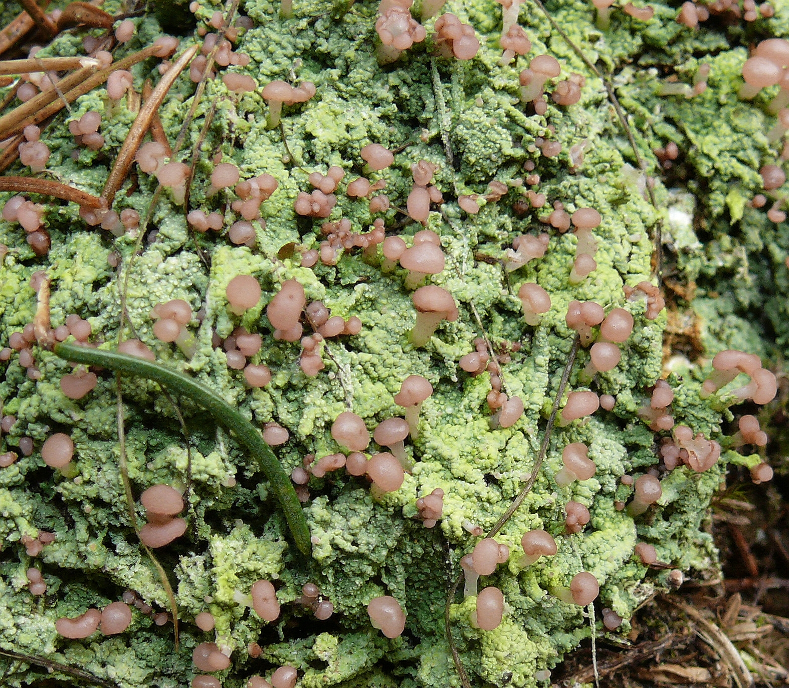 Baeomyces rufus, Schwäbische Alb, Germany